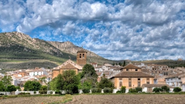 Vista de la localidad española de la Puebla de Don Fadrique, en la provincia de Granada.